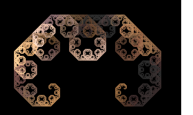 fichier paint à partir d'une image générée par apophysis 2 09